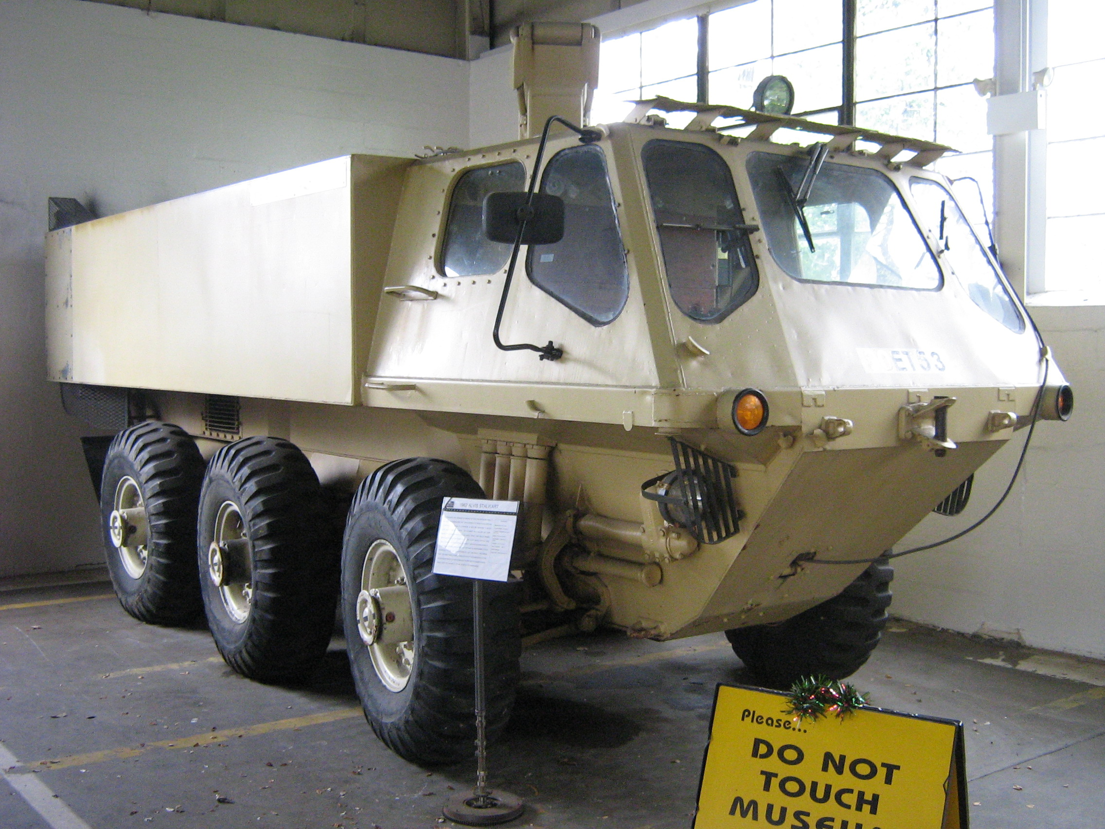 1962 Alvis